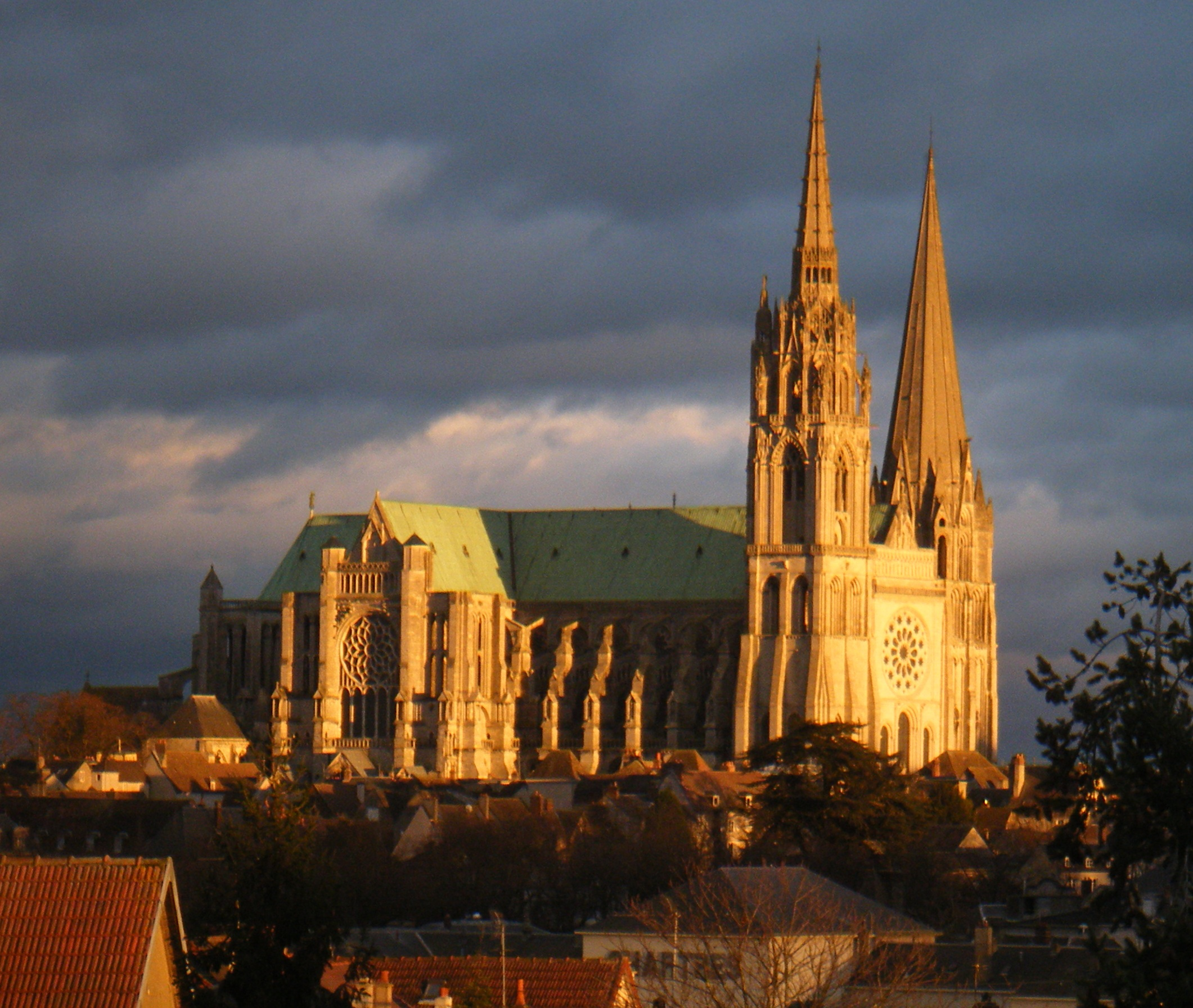 Cathédrale Notre-Dame de Chartres et la gare, éclairage au coucher de soleil